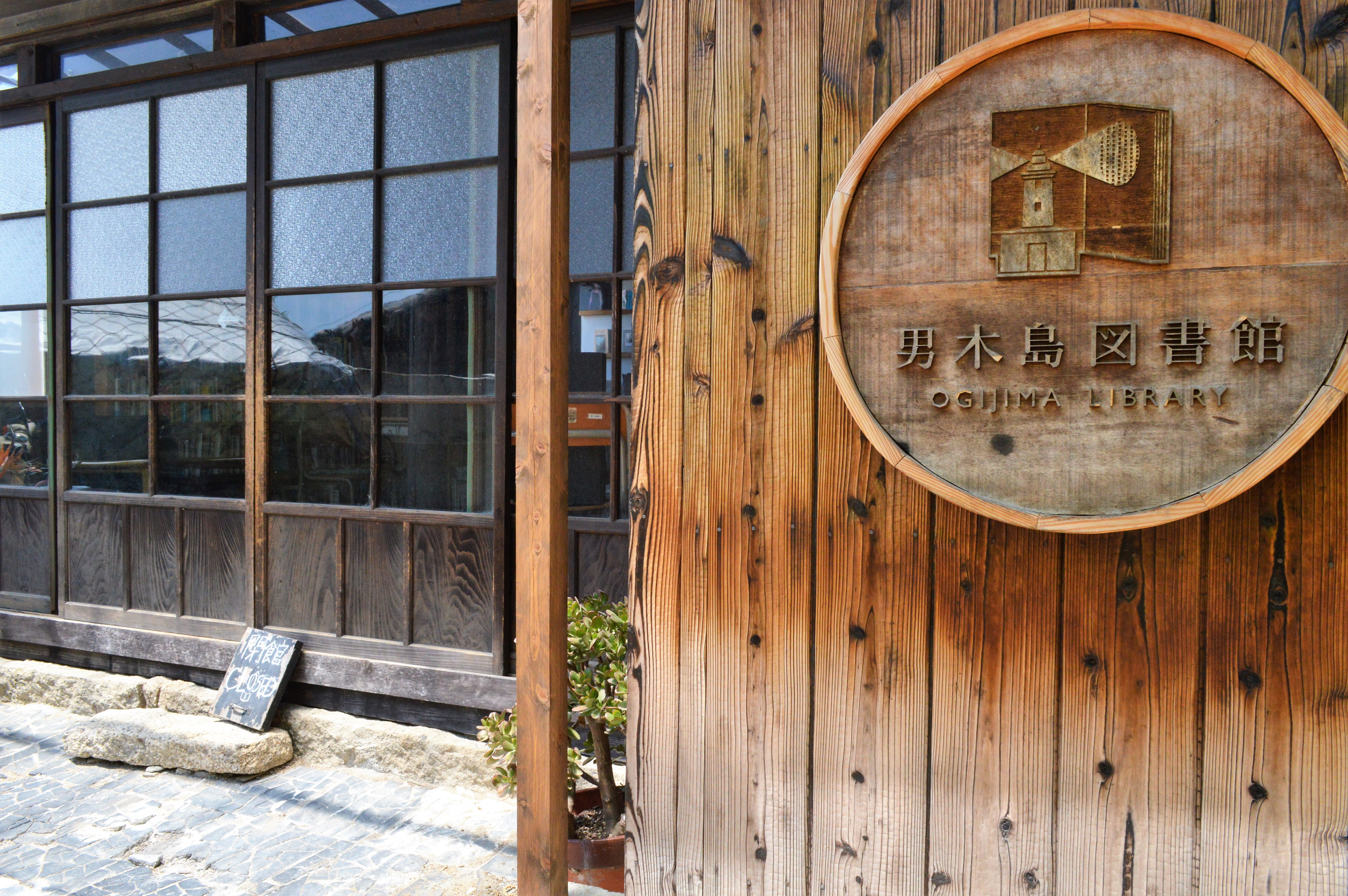 香川県高松市の男木島にある男木島図書館。